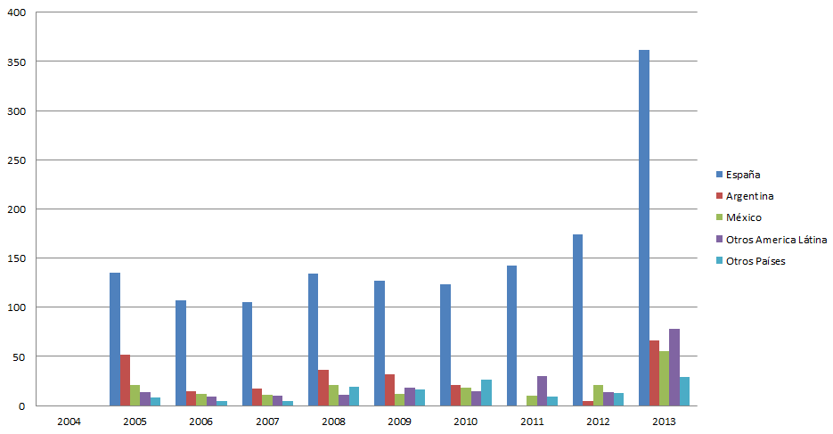 Participacion por año del Premio Minotauro